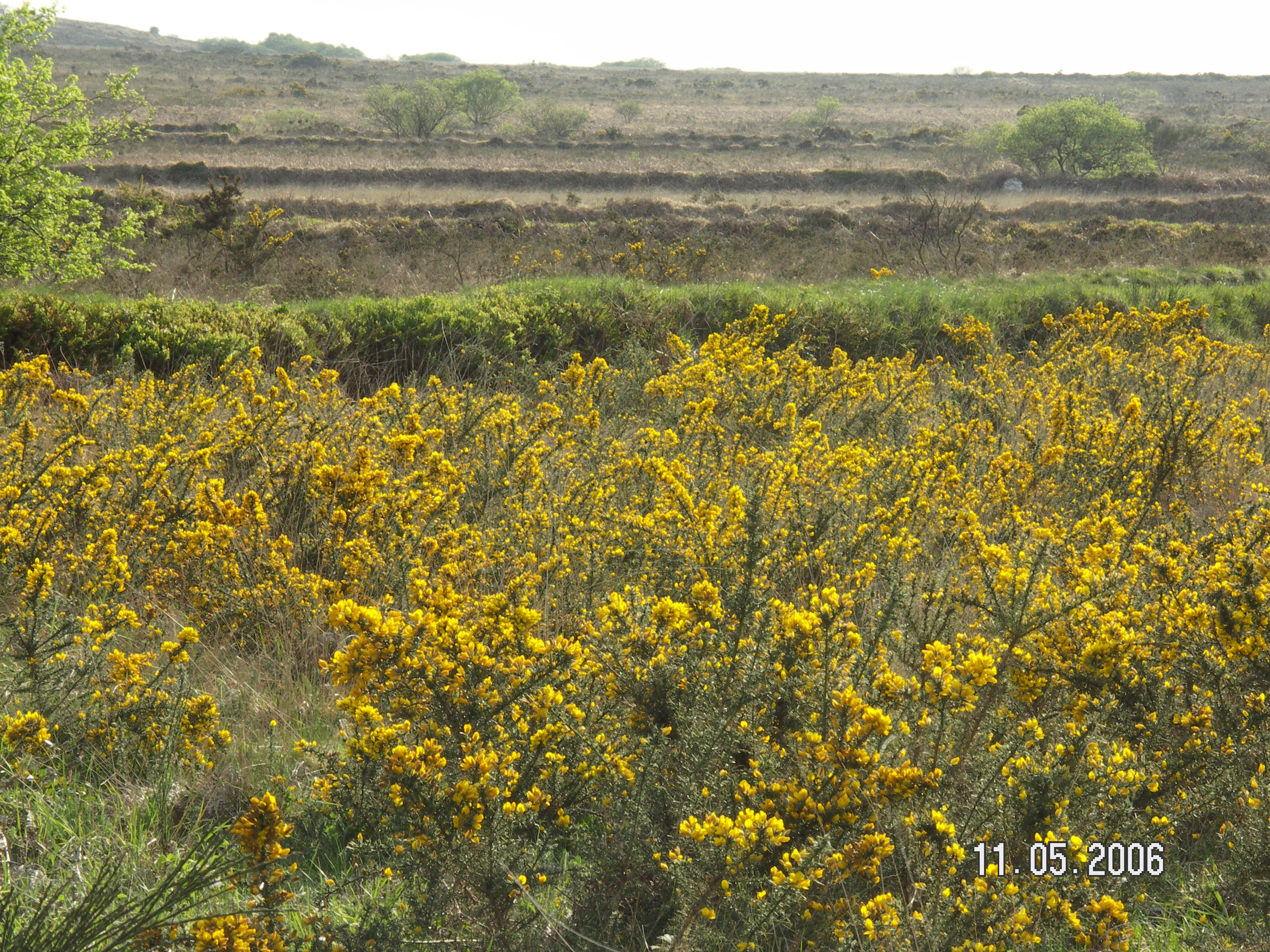 Végétation de lande typique des environs du Yeun Elez et des Monts d'Arrée